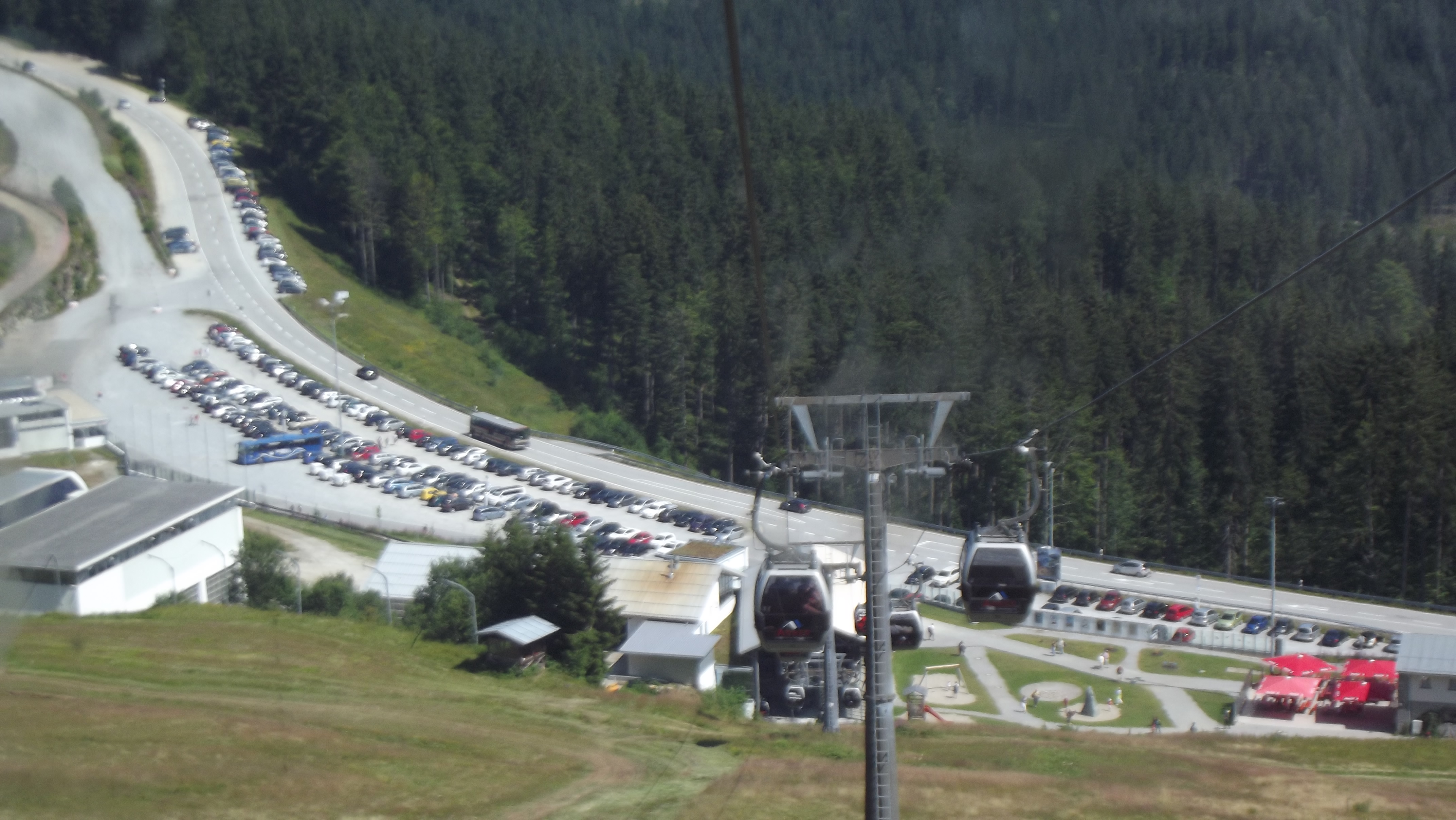 Fotografie z pohoří Velký Javor (německy "Großer Arber").